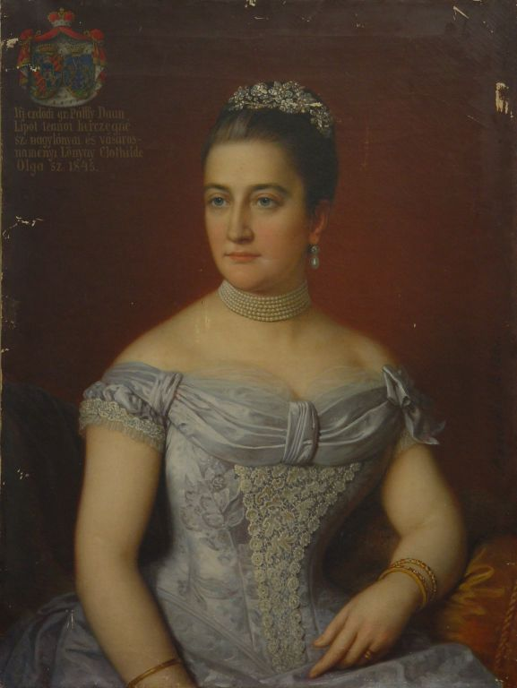 Nagylónyai és vásárosnaményi Lónyay Klotild Olga Pálffy-Daun Lipót felesége.